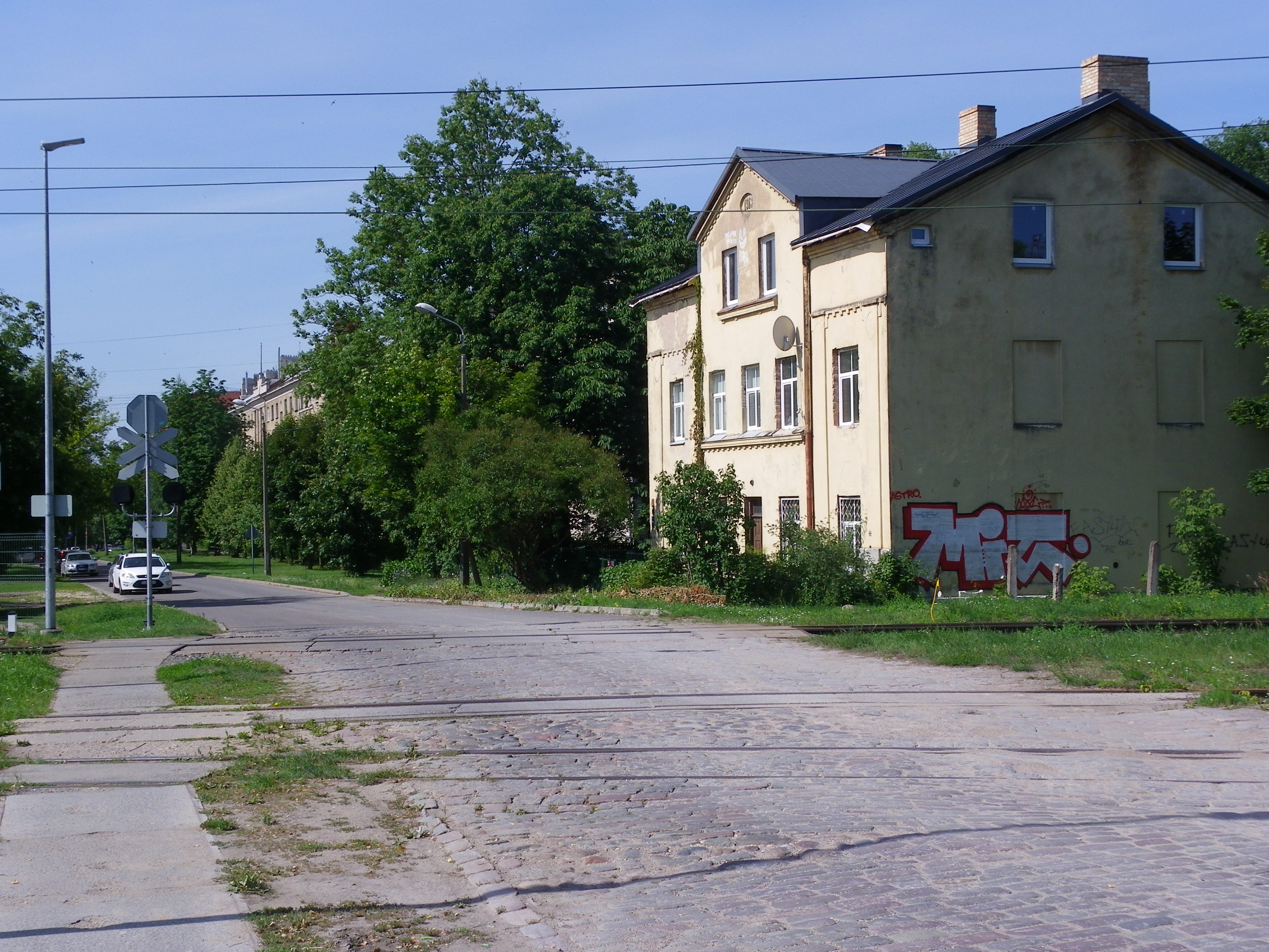 Rēznas iela Rīgā